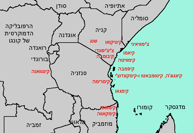 ניבים סווהילי